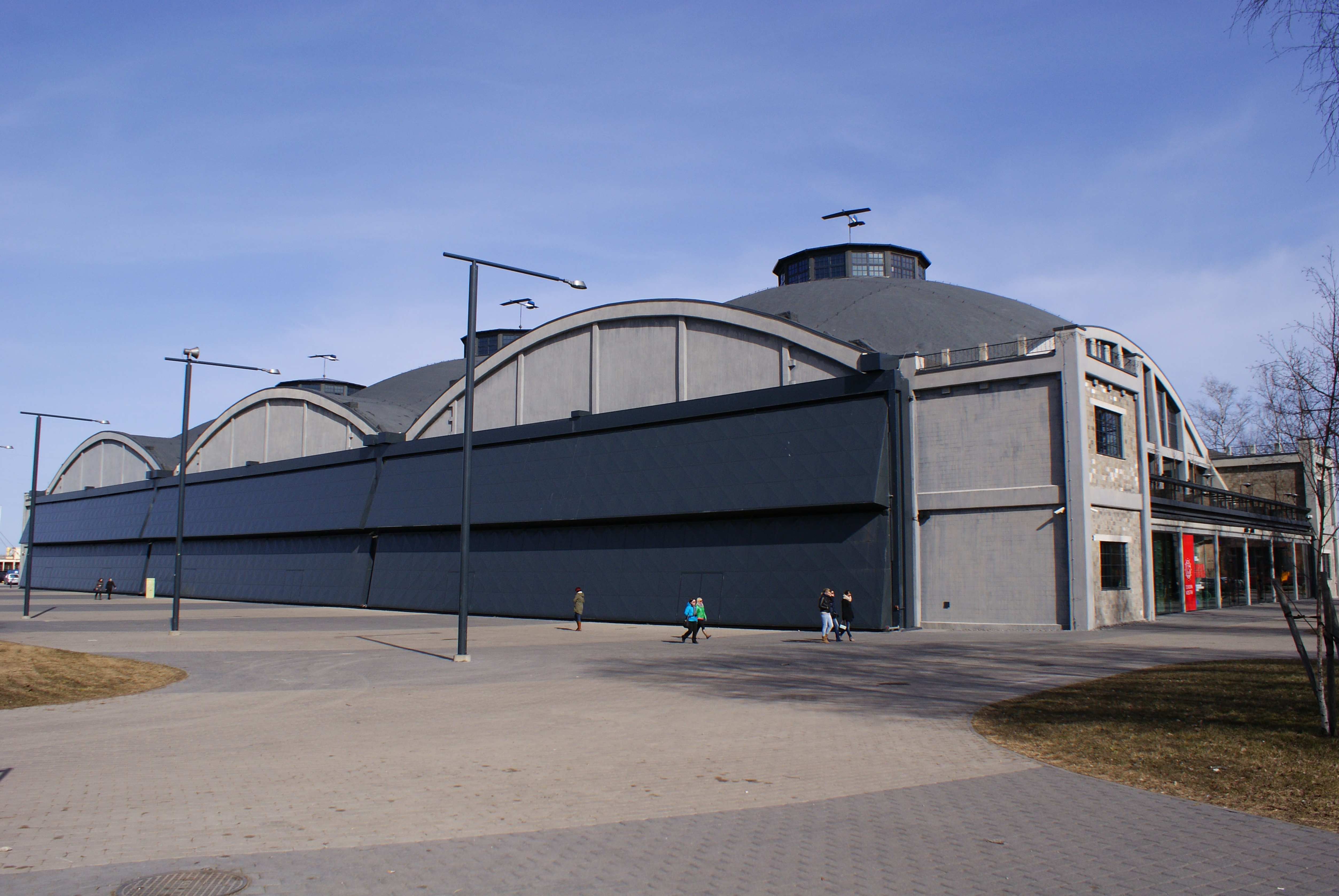 Vesilennukite angaarid